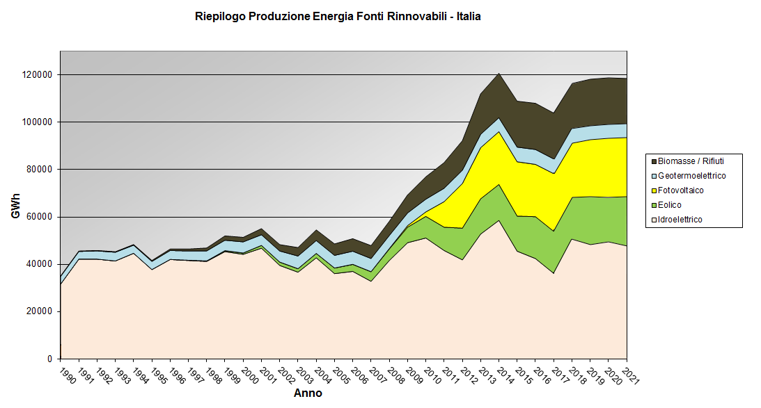 Riepilogo storico produzione energia rinnovabile italiana.